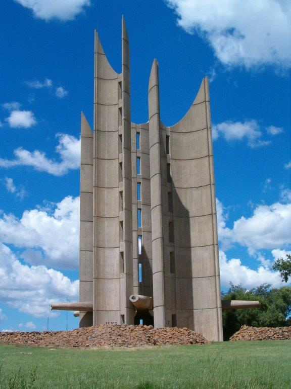 Winburg se Voortrekkermonument